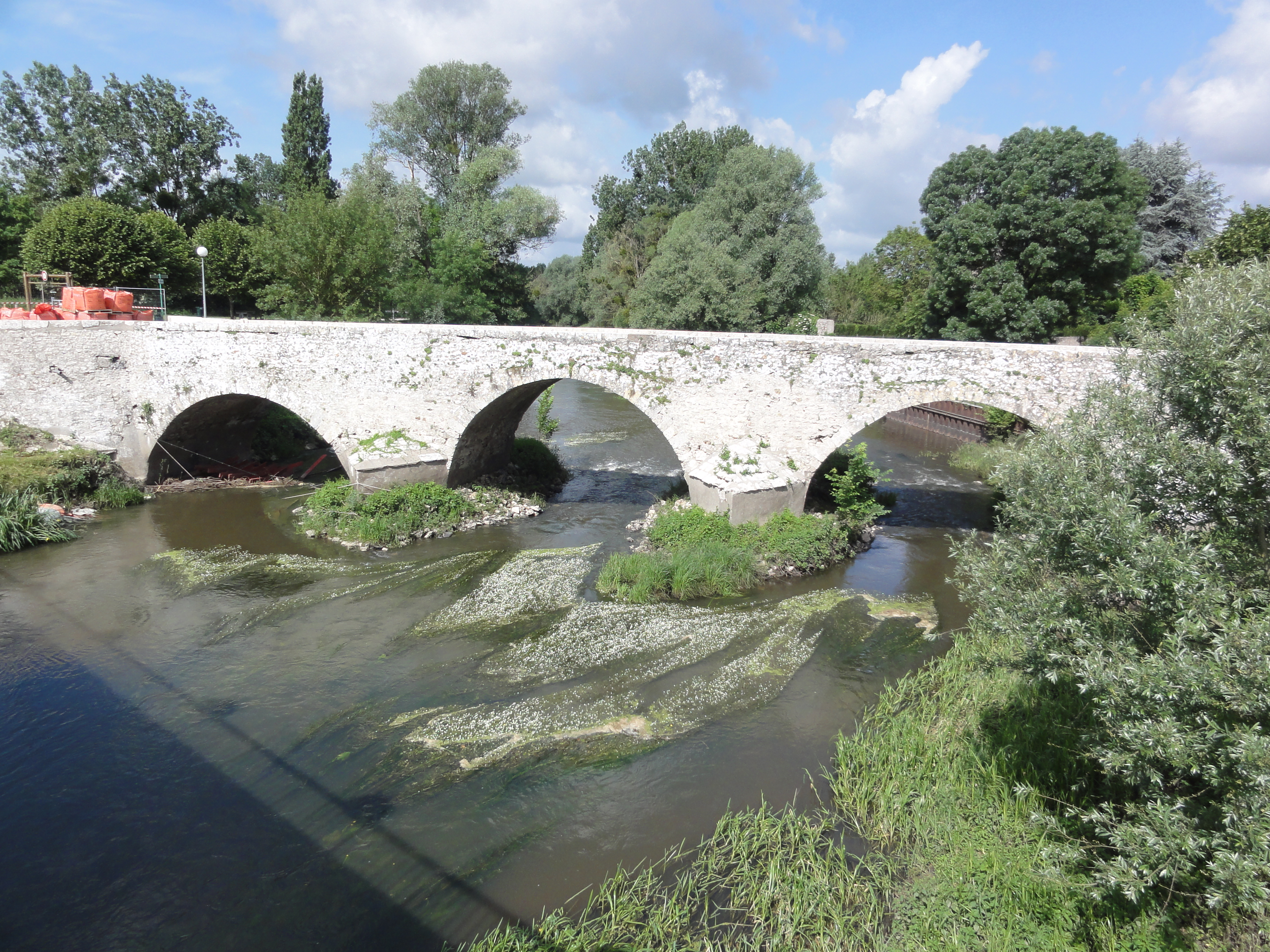 Candé-sur-Beuvron (Loir-et-Cher) Vieux pont sur le Beuvron